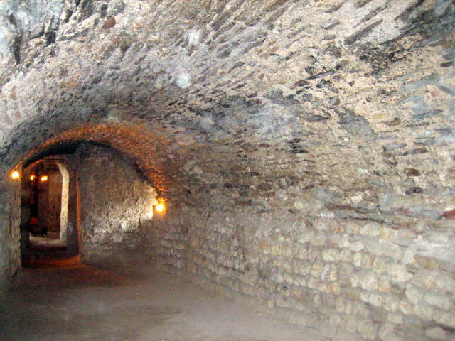 Interior castell del Papiol a la comarca del Baix Llobregat - Catalunya